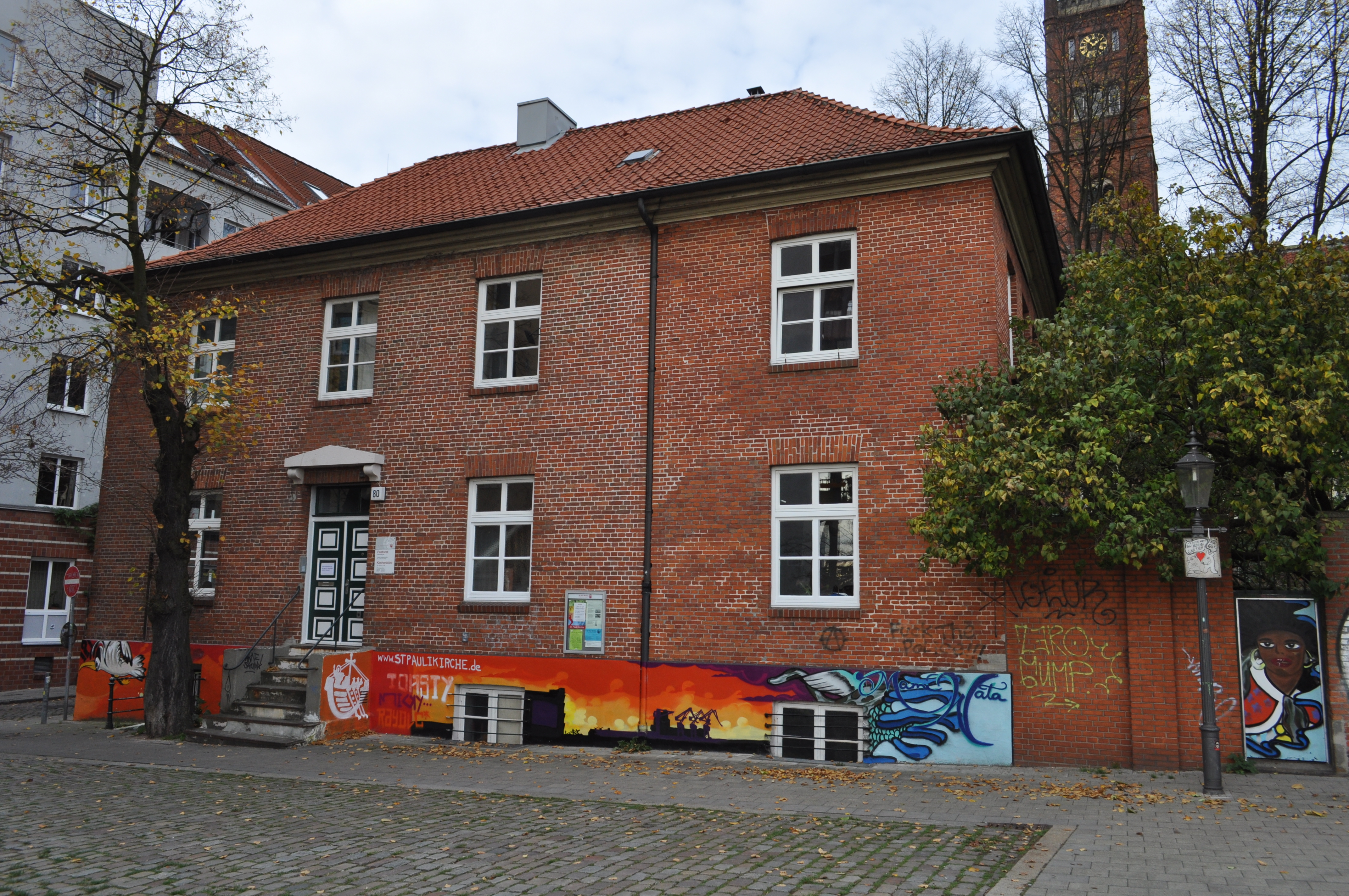 Pastorenhaus Pinnasberg 80 in Hamburg-Altona-Altstadt. This is a photograph of an architectural monument.